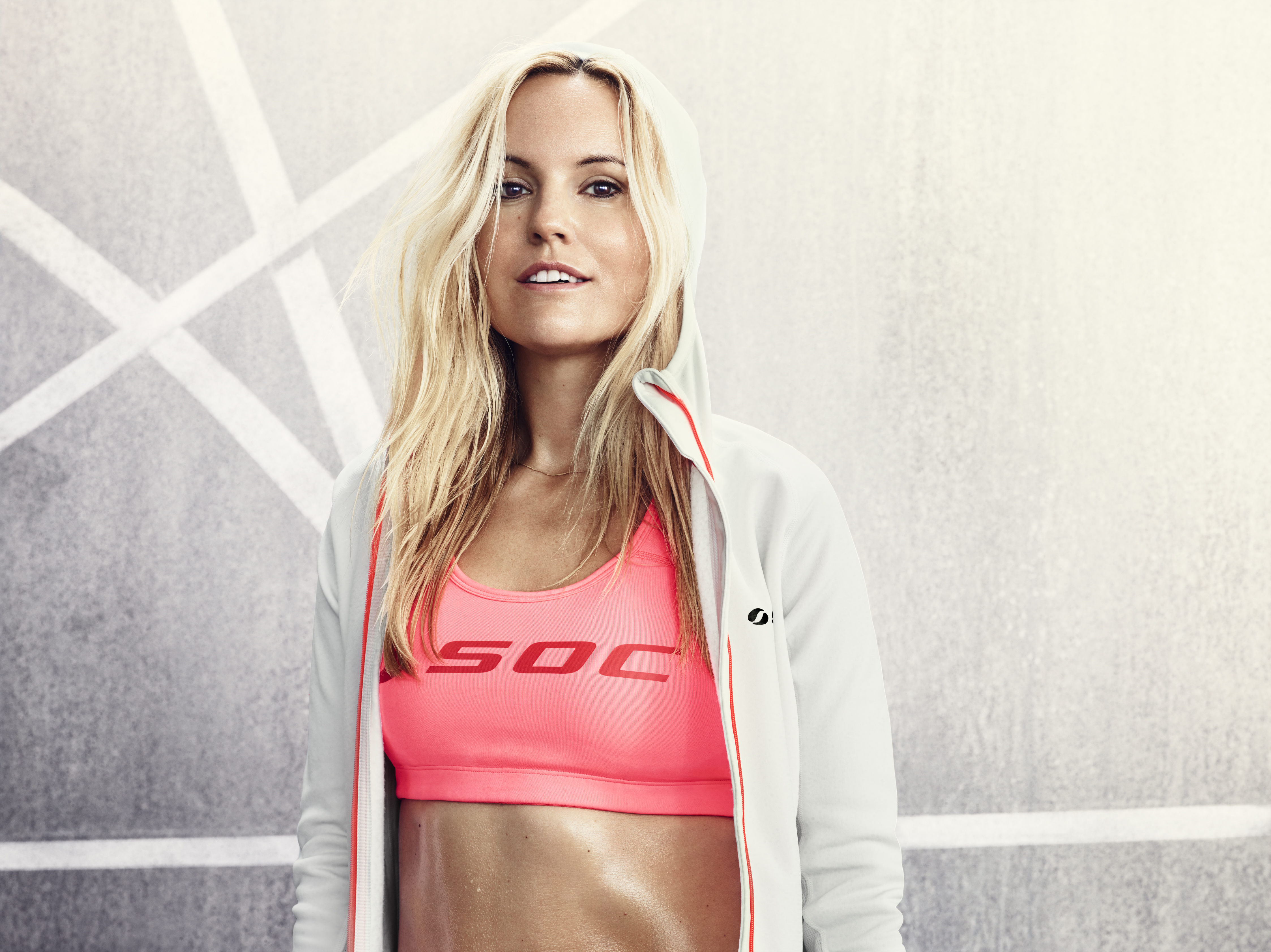 Modejournalisten Sofi Fahrman.